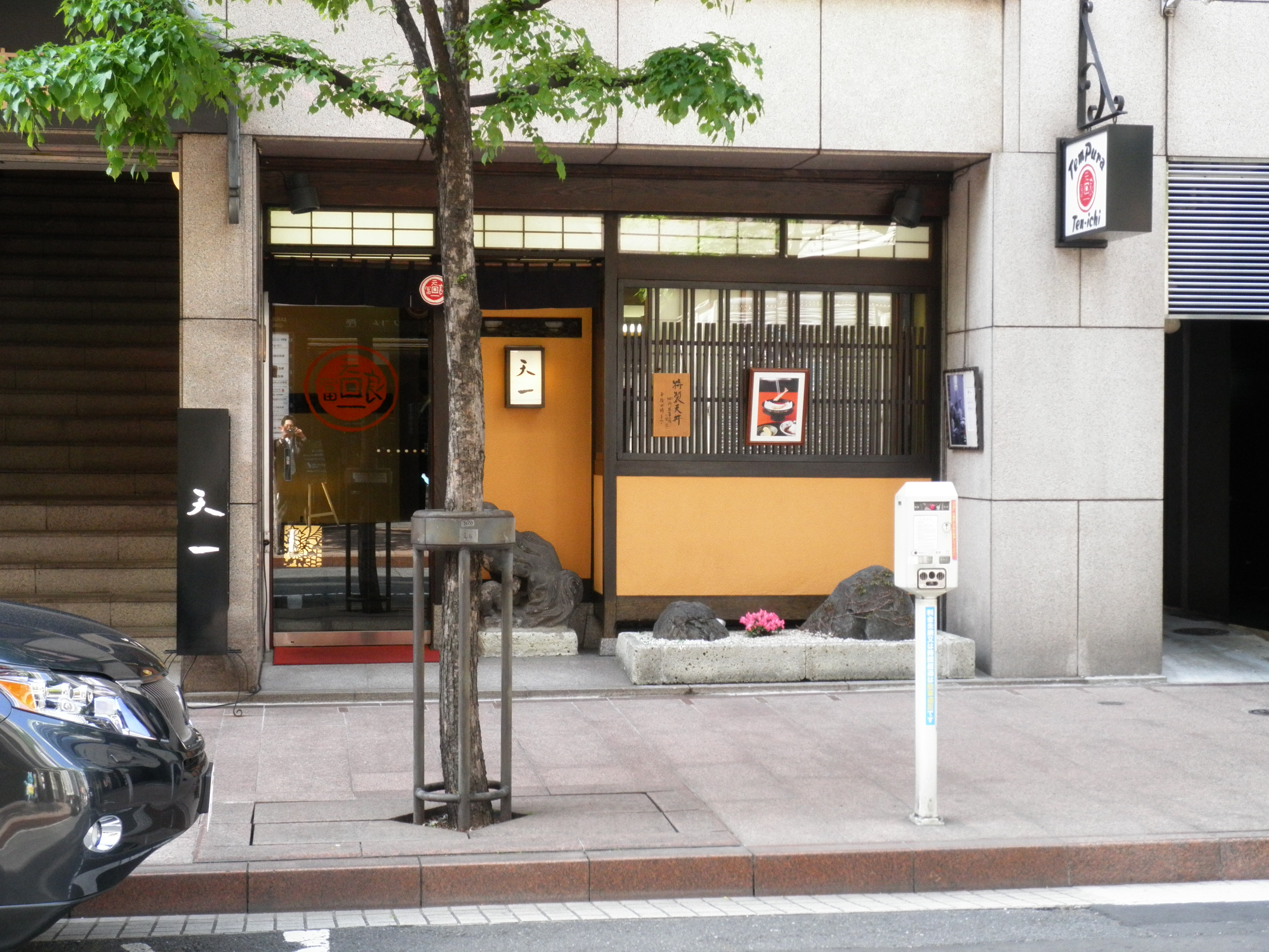 銀座天一本店